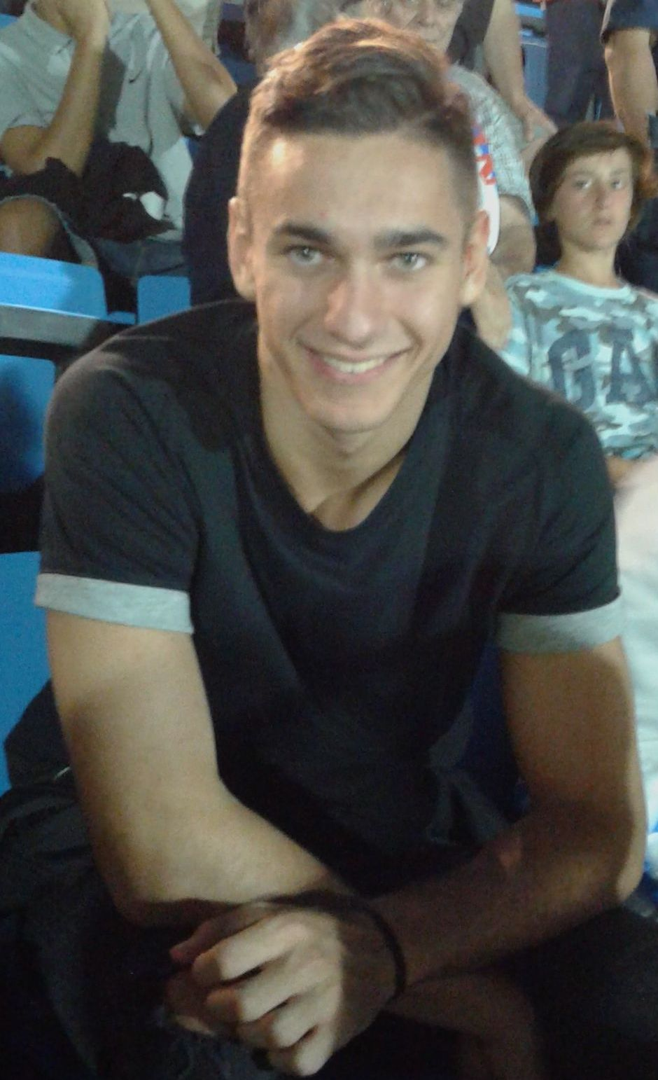 Alex Meret portiere della Spal